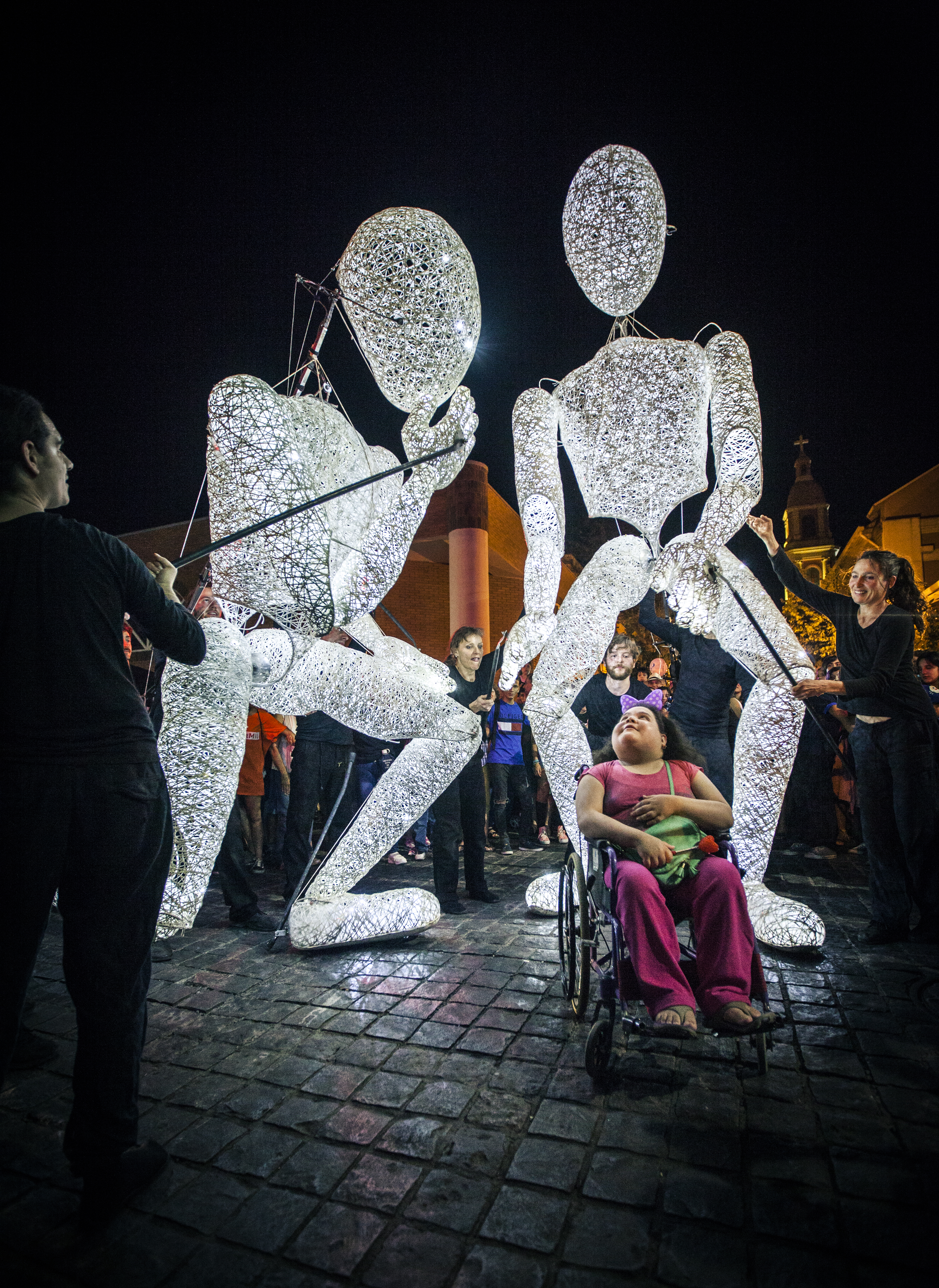 DUNDU am 13.01.2017 (Premierentag von Santiago a Mil) in Rancagua, Chile in einer emotionalen Interaktion mit einem Mädchen im Rollstuhl.